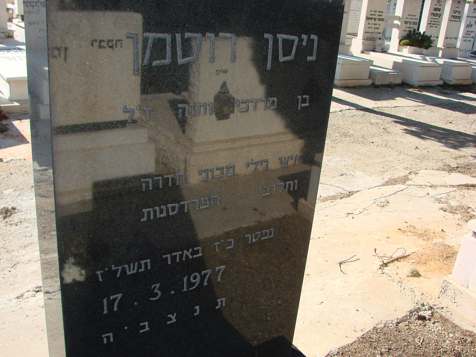 המצבה של ניסן רוטמן